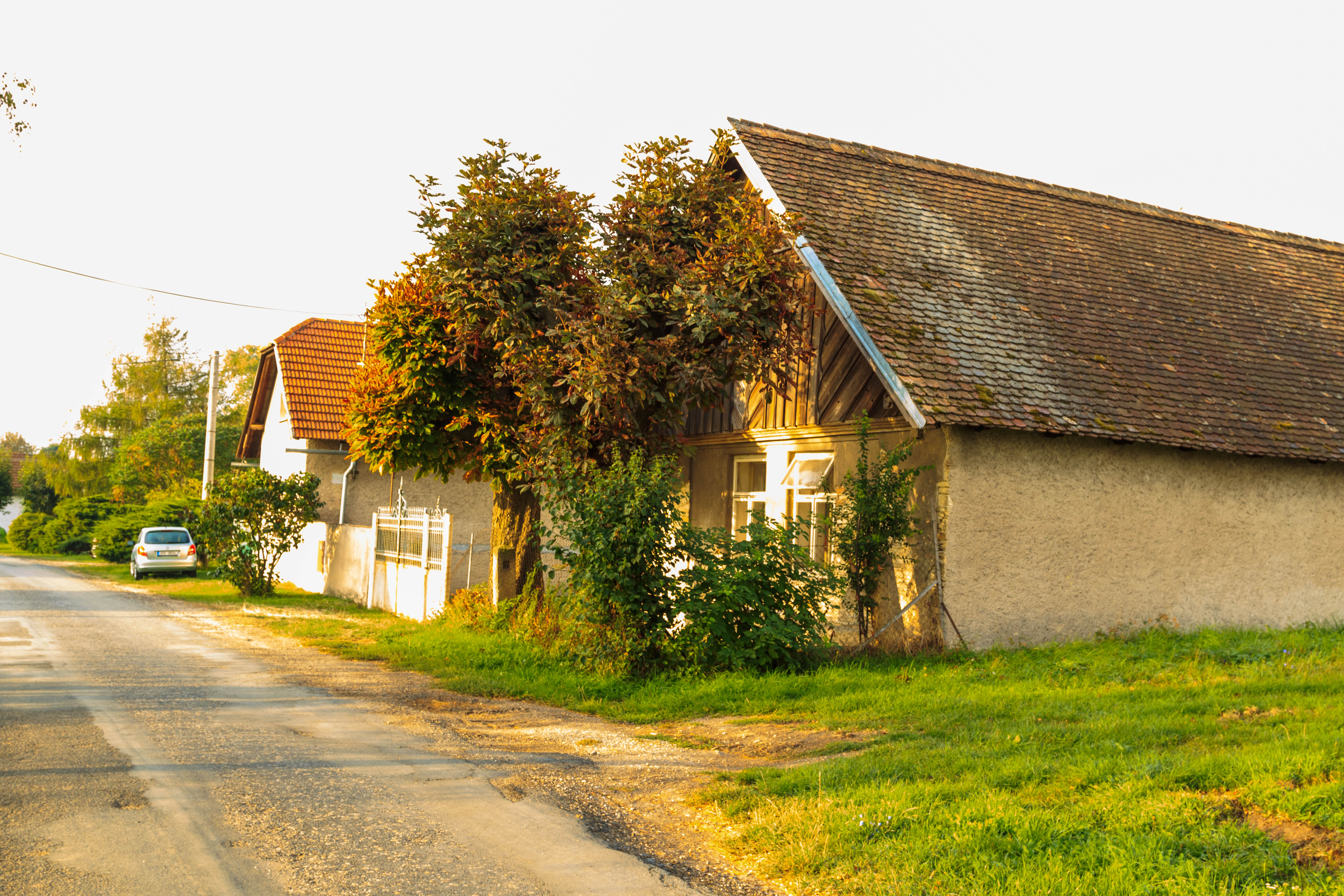 Slibovice čp. 6